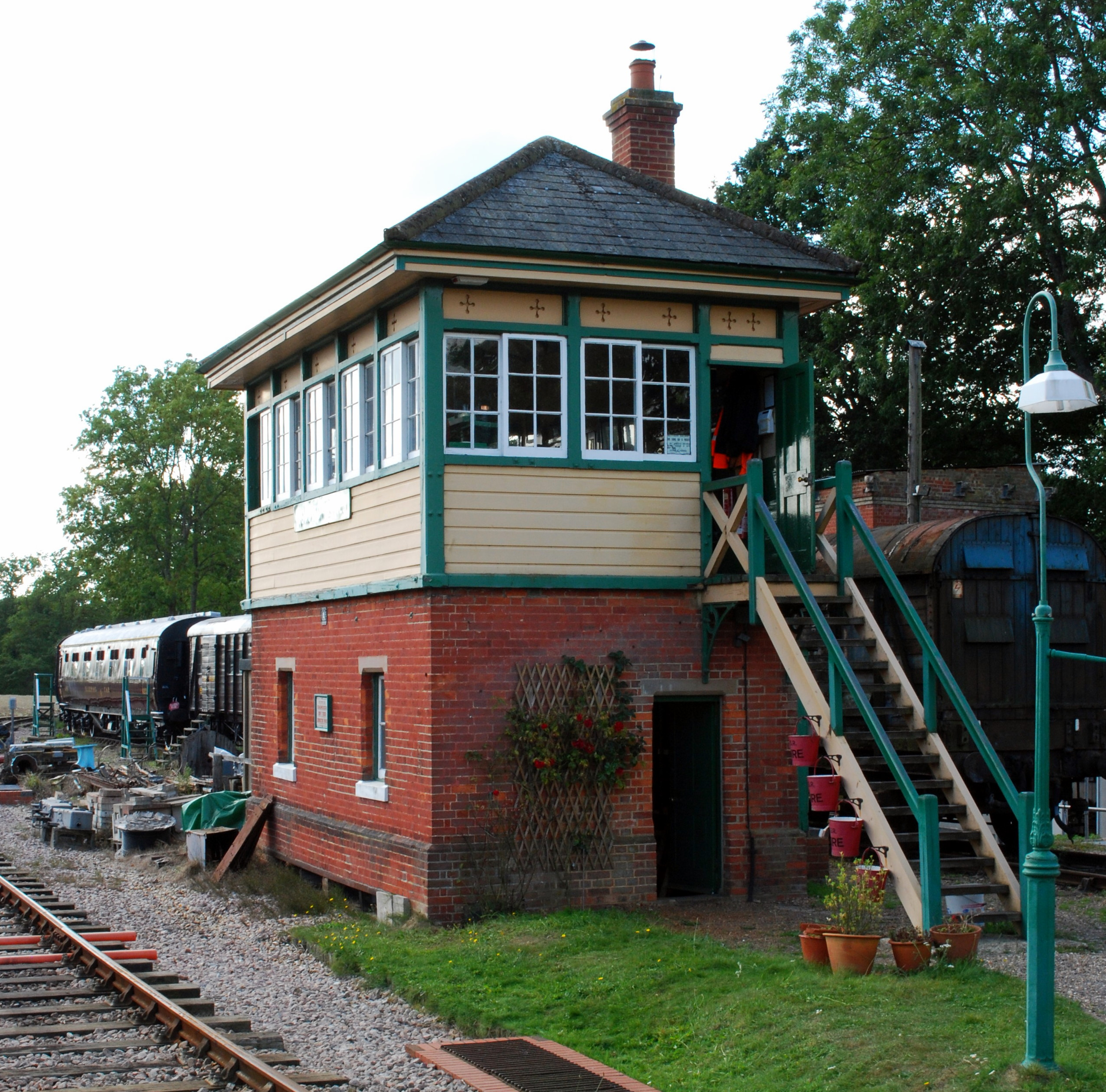 Horsted Keynes signalbox